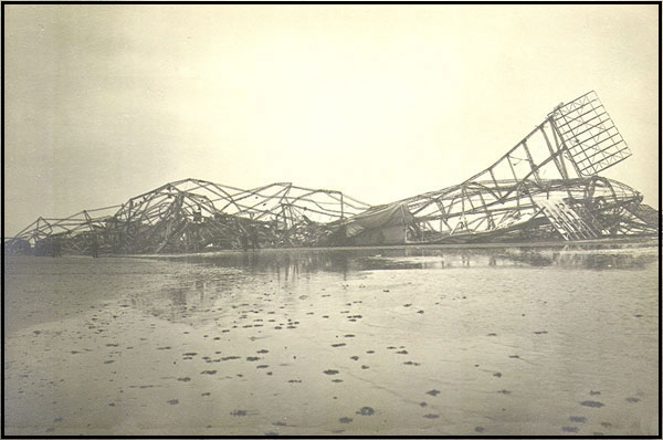 Nedstyrtet tysk Zeppeliner på Fanø (L 3)